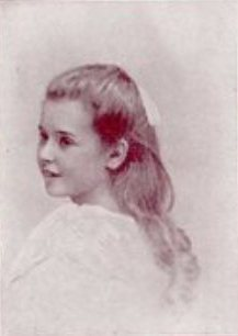 Marie-Antoinette de Geuser, detta Consummata (1889 – 1918), a 12 o 13 anni.